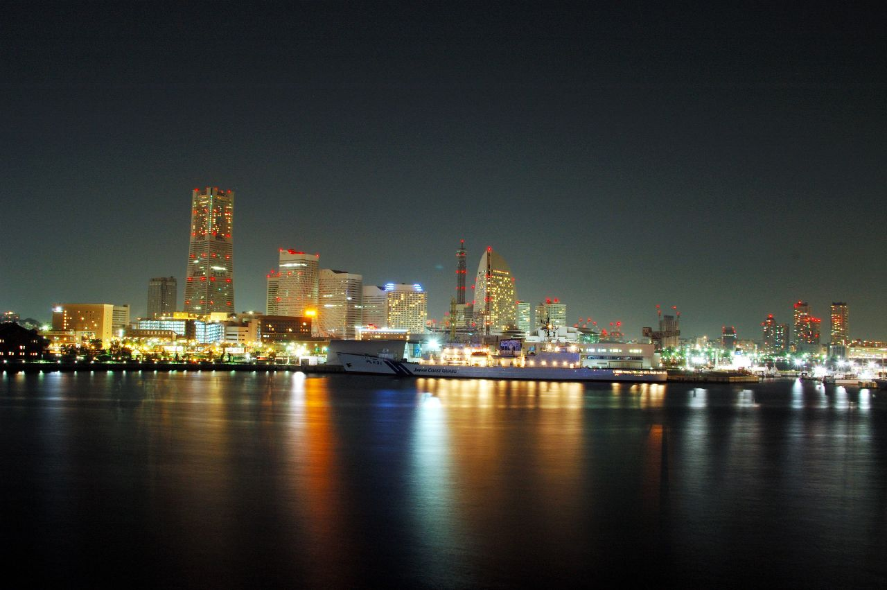 Minato Mirai 21, Yokohama, Japan